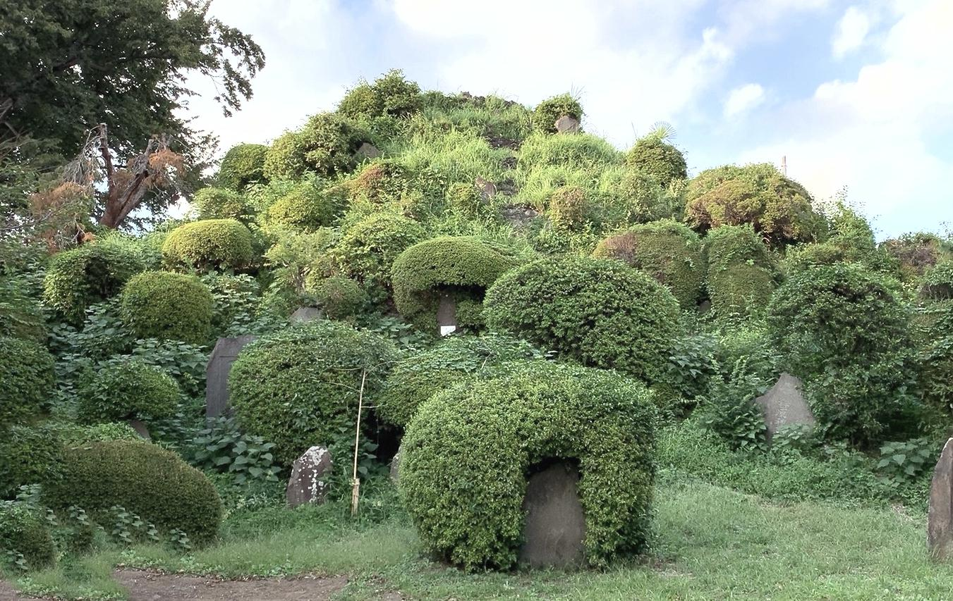 練馬区大泉 八坂神社 中里の富士塚 高さ約12m 平成2年度 練馬区指定文化財